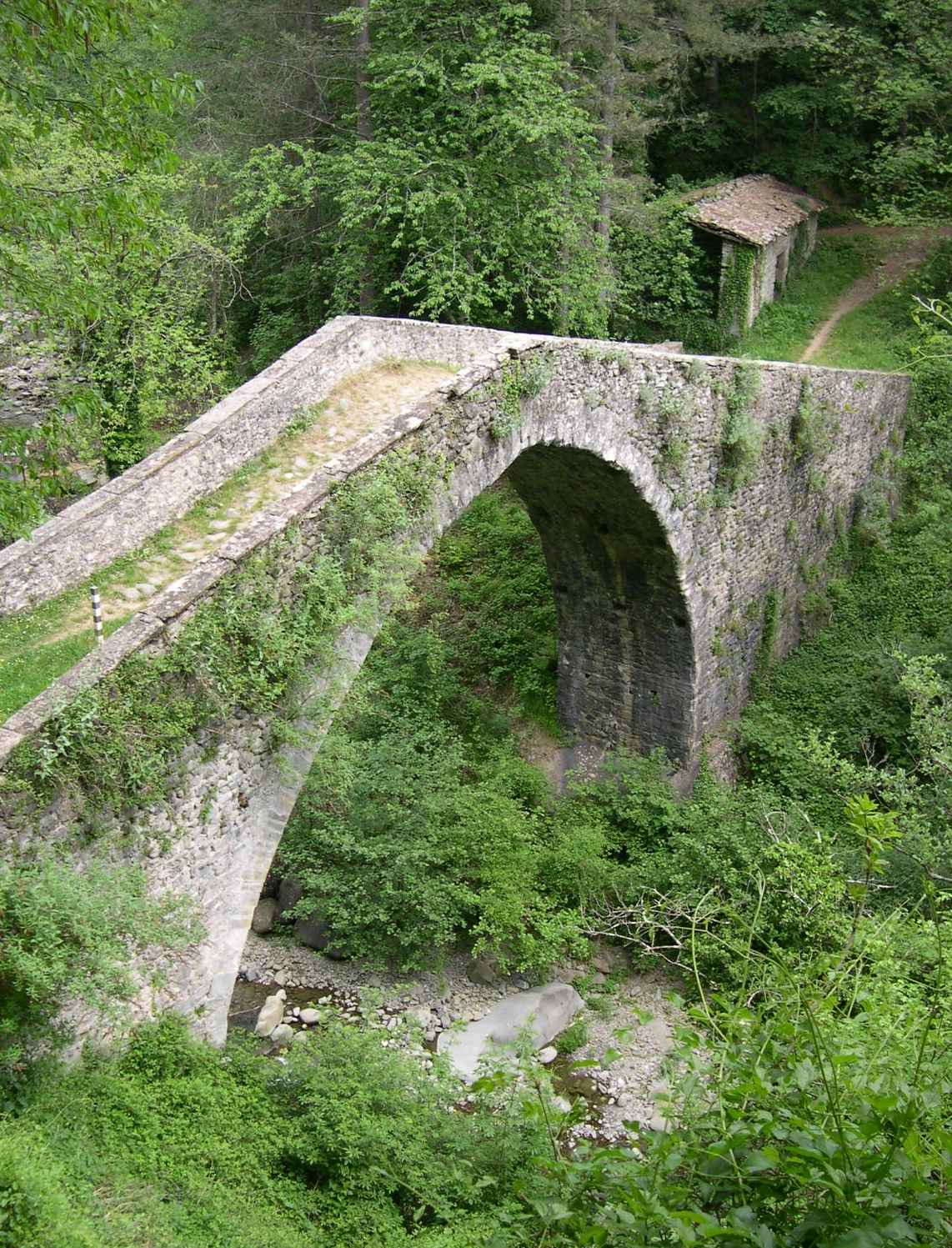 The medieval bridge of Castiglione di Garfagnana - Italy